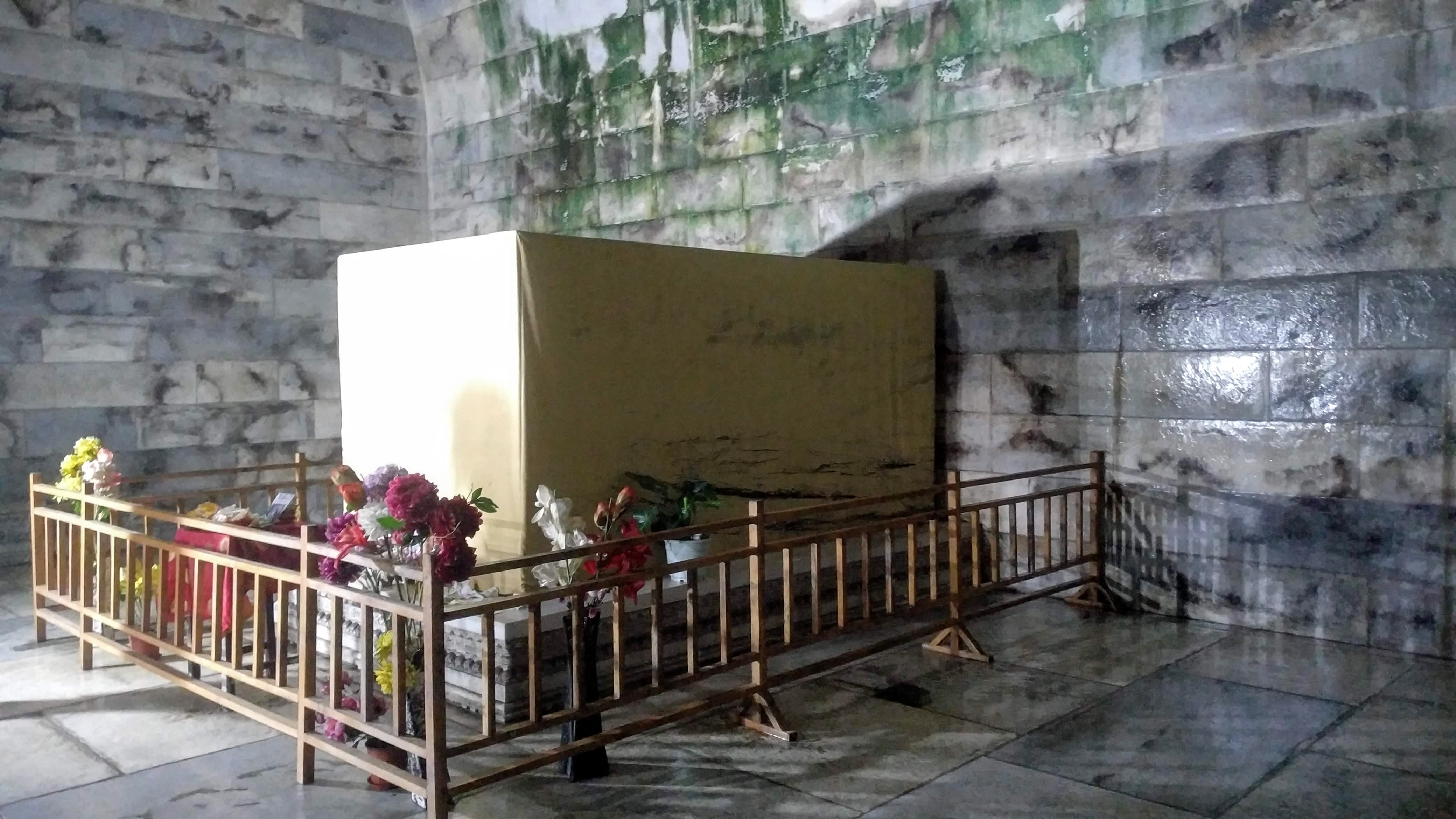 慈溪所在的定东陵地宫内，棺已用黄布覆盖。